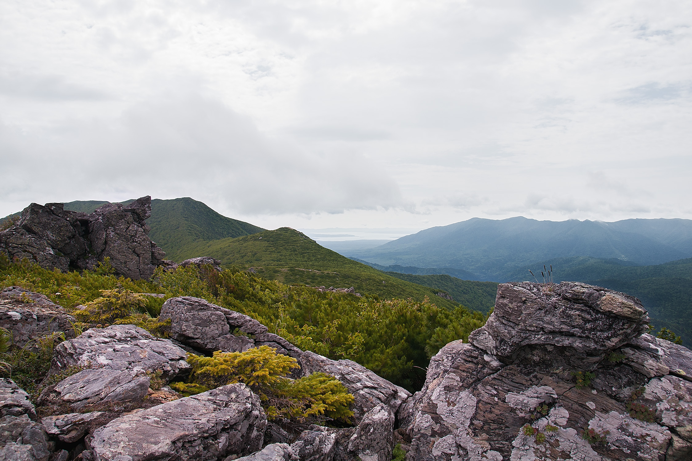 Сусунайский, на туристической тропе к пику Чехова This image is related to the protected area of Russia number 6500004